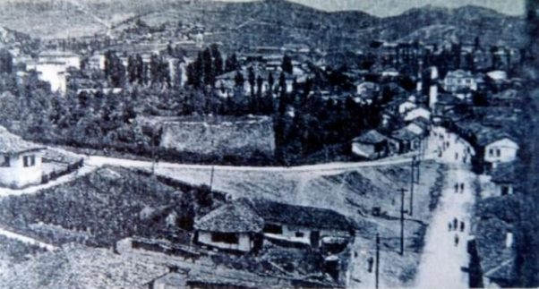 Pamje e qytetit të Novi Pazarit, i ashtuquajturi Kalaja- Hendeku, dhe rruga e "Stambollit"